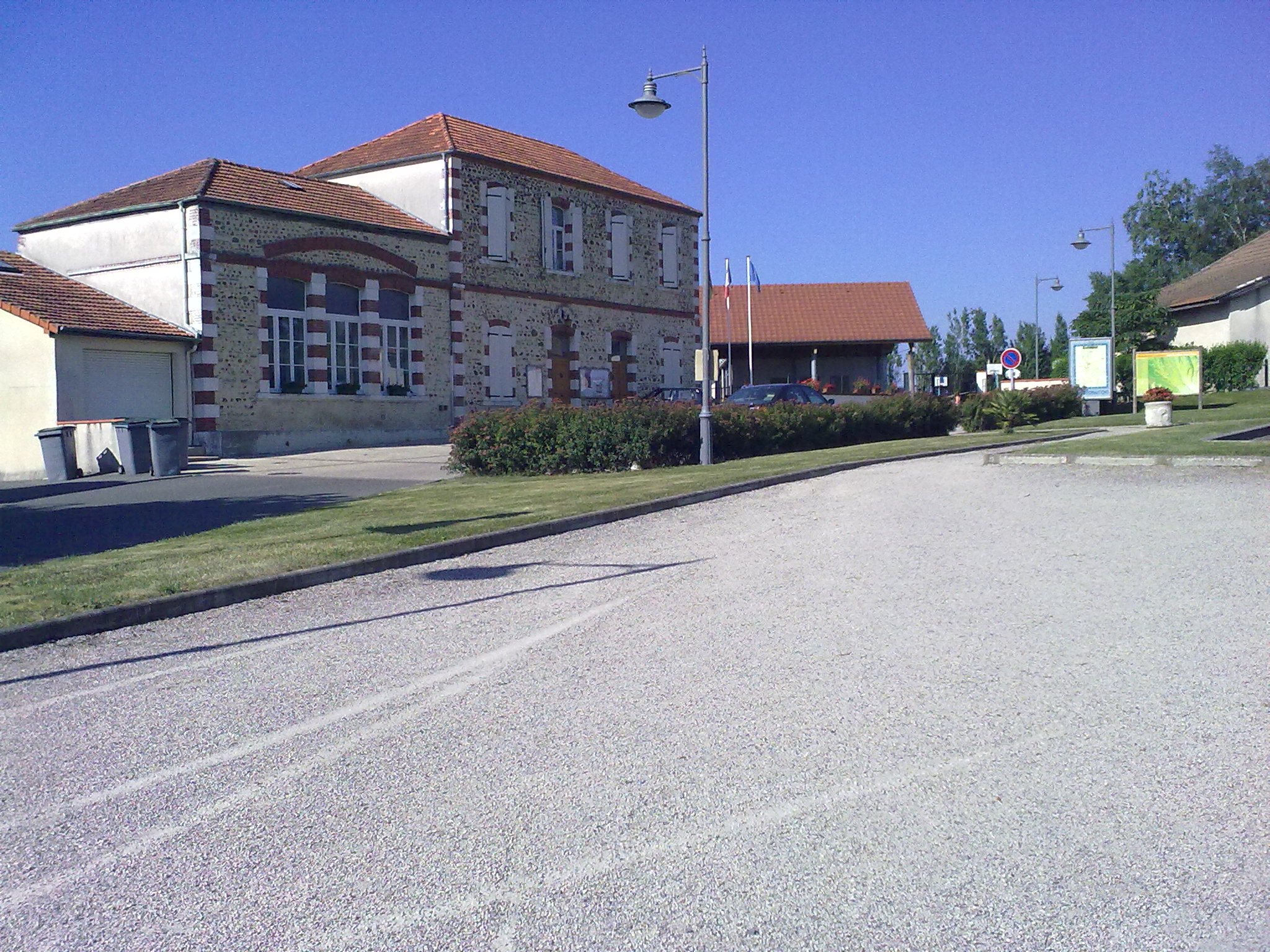 Mairie à gauche et école à droite de Barinque.